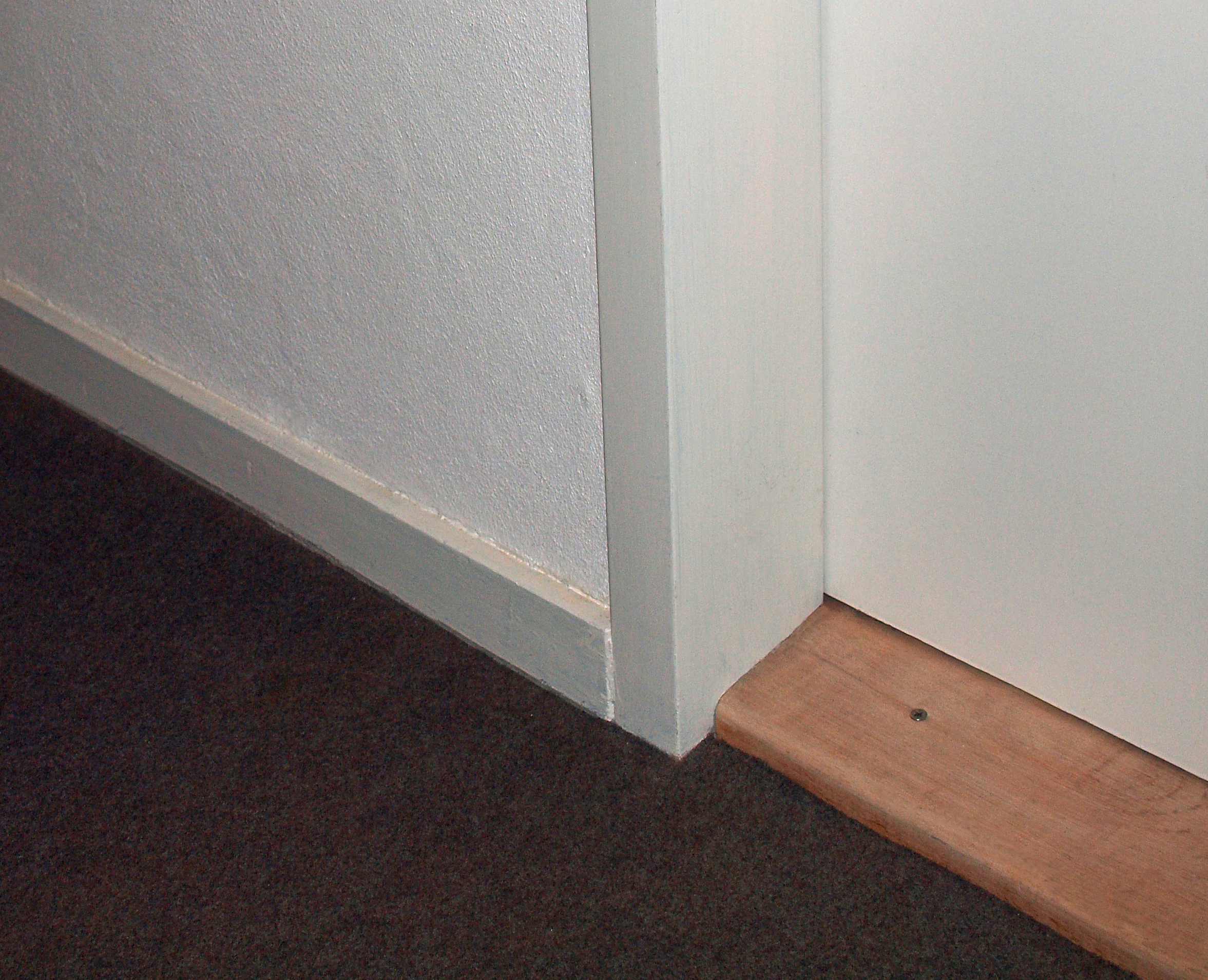 houten plint en beuken stofdorpel